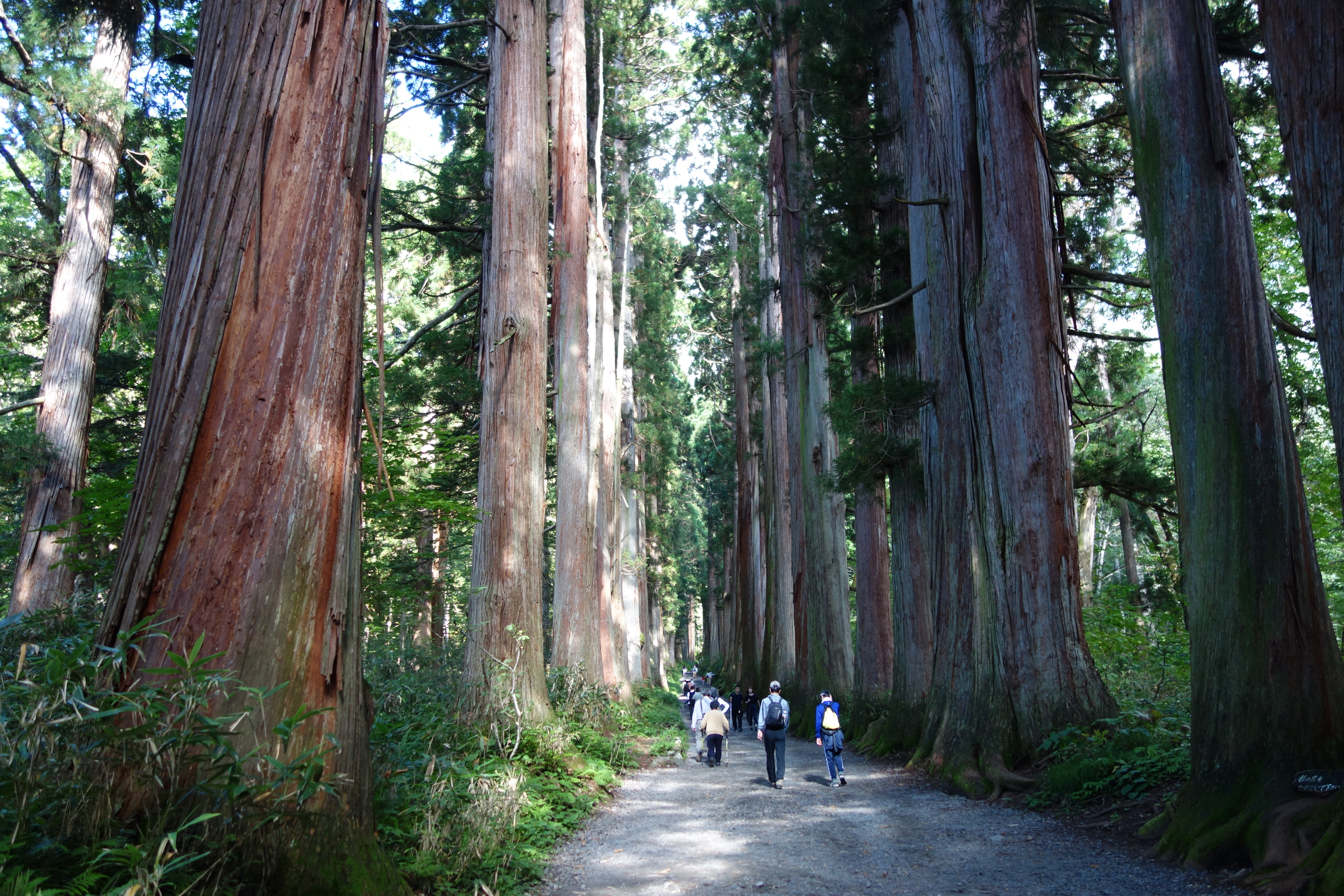 戸隠神社奥社へと続く杉並木